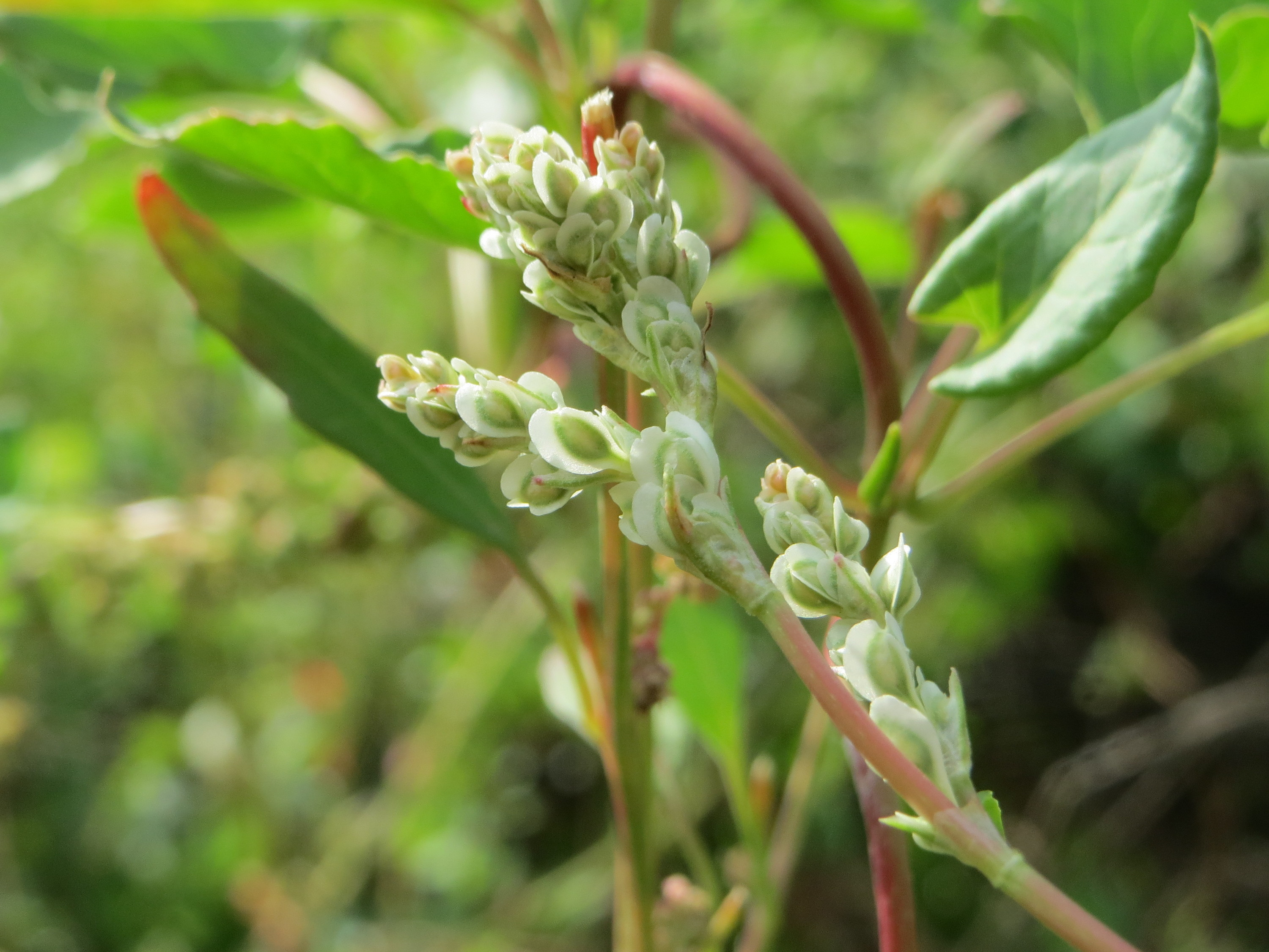 Schlingknöterich (Fallopia baldschuanica) in Hockenheim